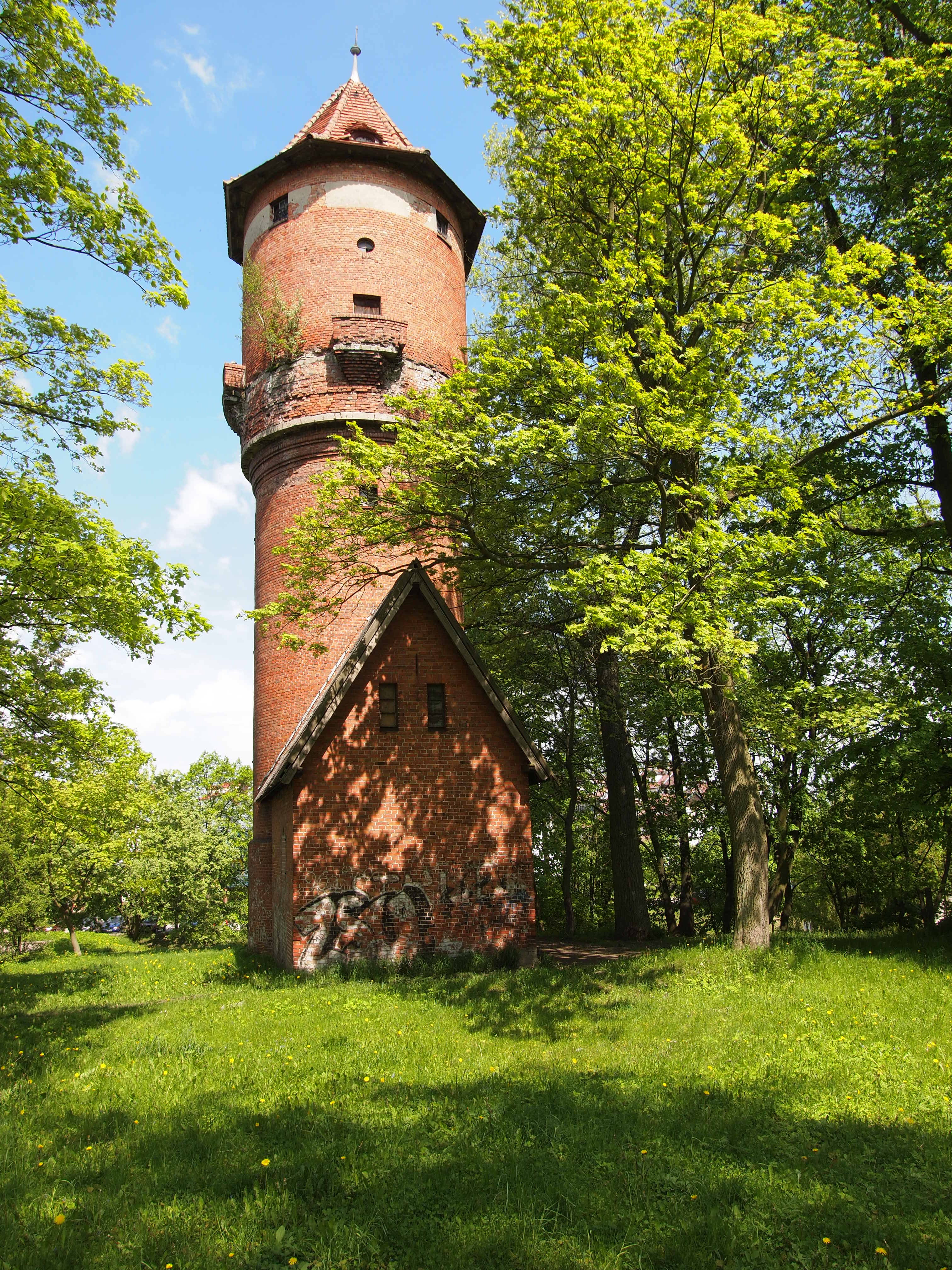 Sztum, ul. Kochanowskiego - miejska wieża ciśnień (1911), znajduje się na terenie dawnego cmentarza ewangelickiego. W przybudówce stacja pomp.